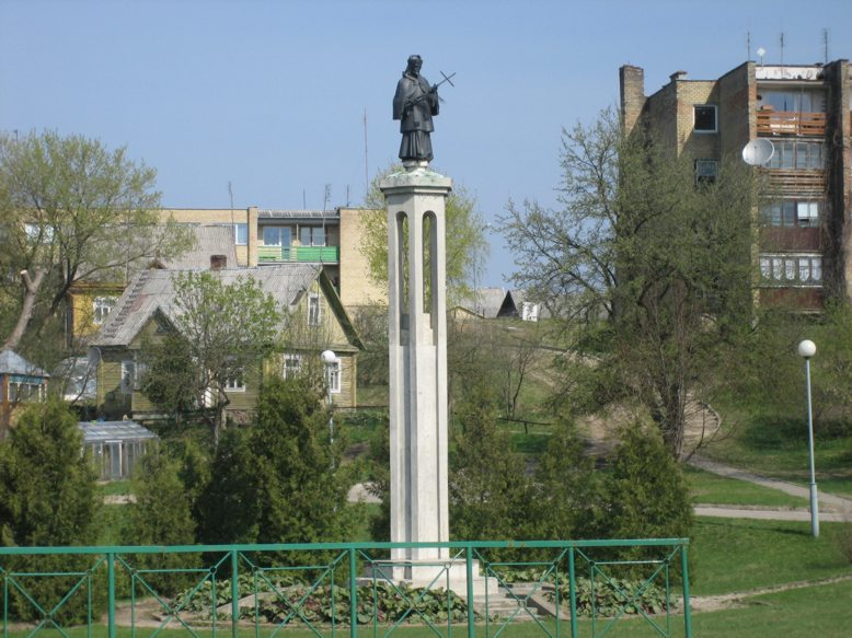 Šv. Jono Nepomuko skulptūra Molėtuose (autorius V. Navickas)